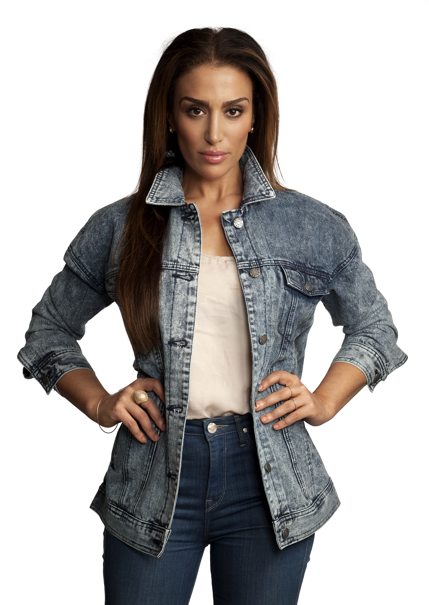 Musikjournalisten och radioprataren Ametist Azordegan.